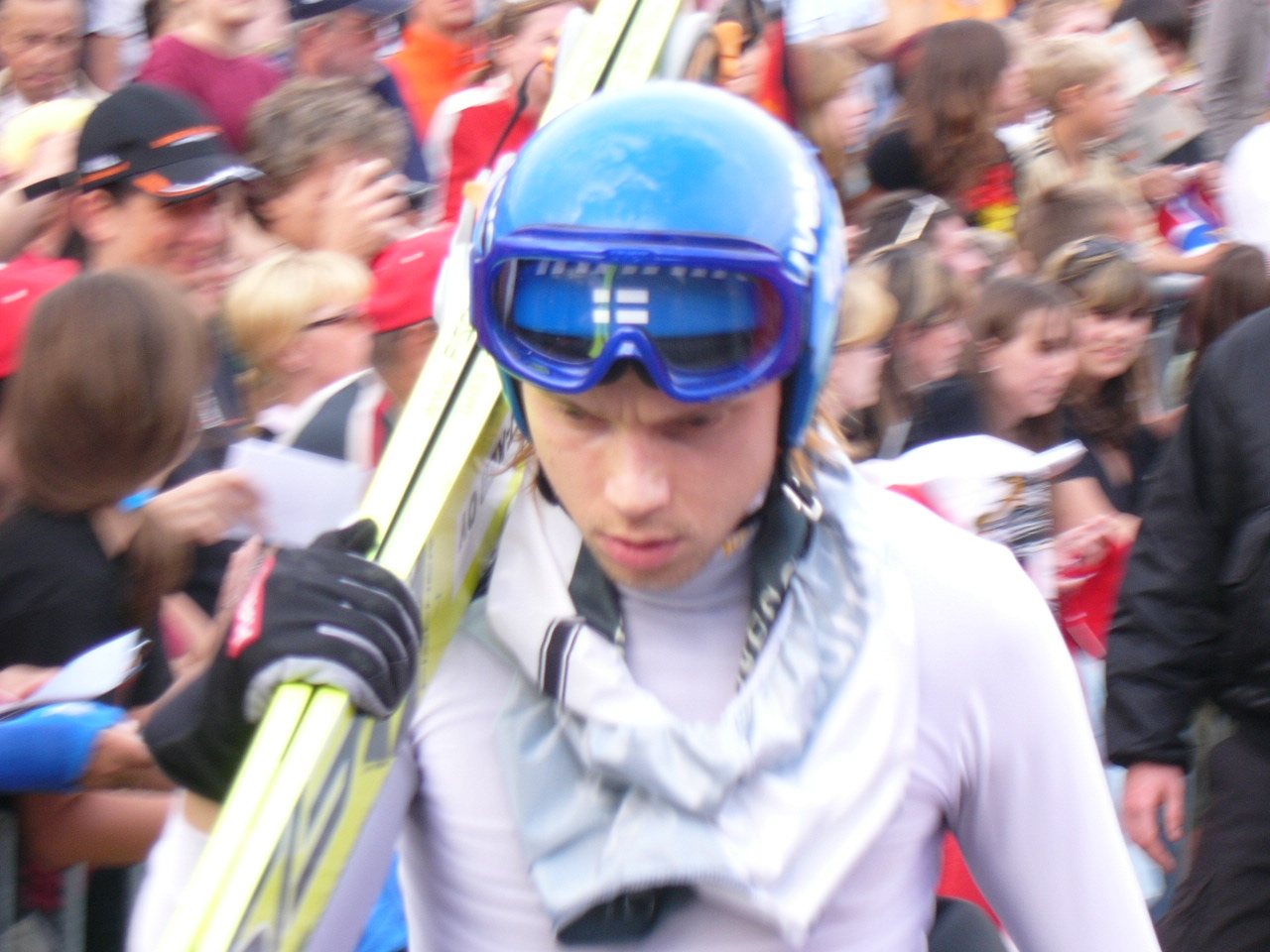 Sommer-Grand Prix in der Vogtlandarena am Schwarzberg in Klingenthal/Sa. 2007